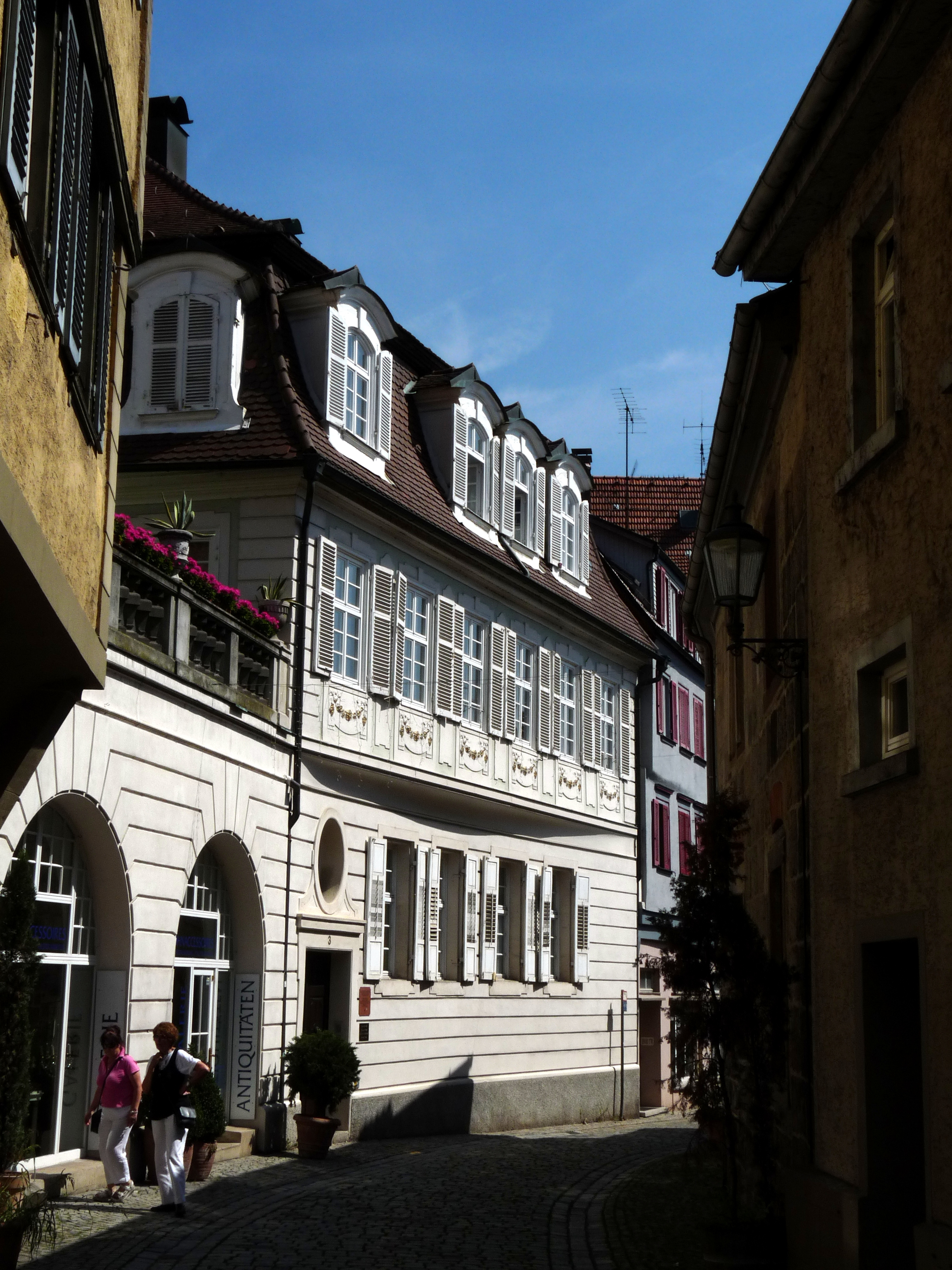 Esslingen - Konstanzer Pfleghof